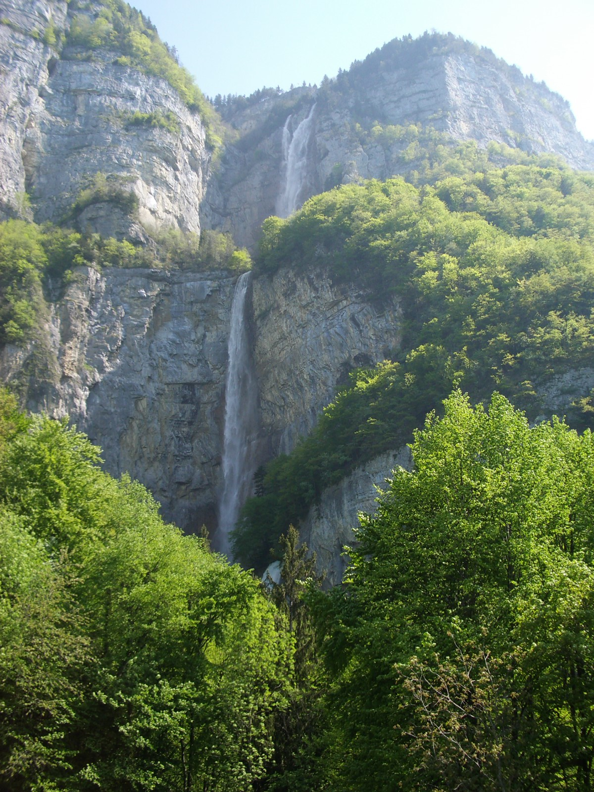 Seerenbach Falls SG, Switzerland